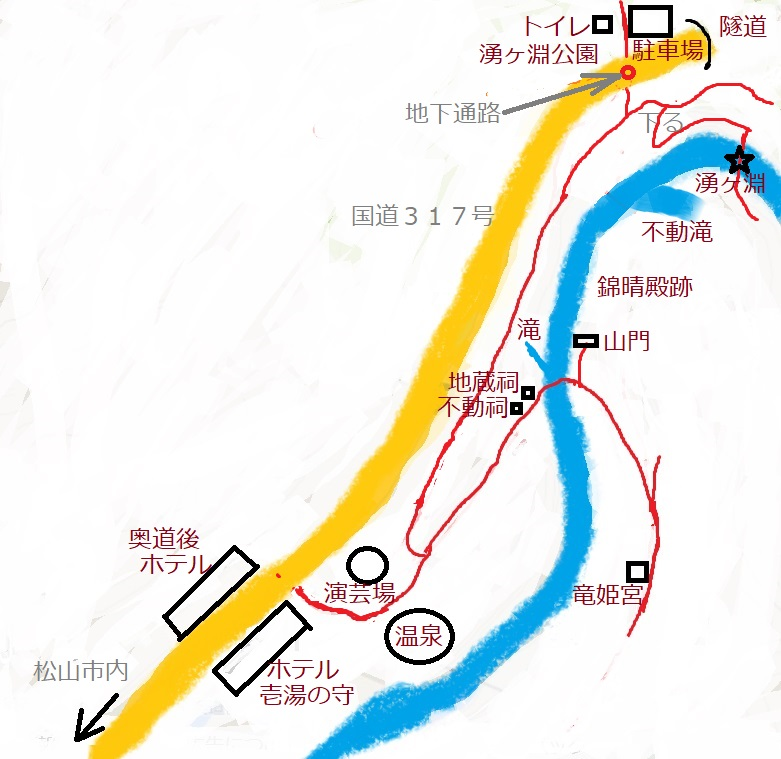 湧ヶ淵の概略図